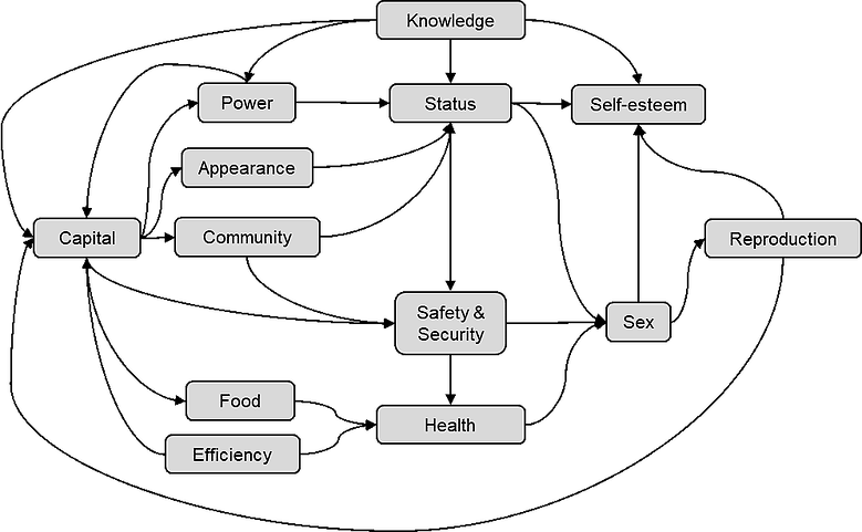 Erstes Modell für ein Life Quality Modell, Kernelement des Life Engineering